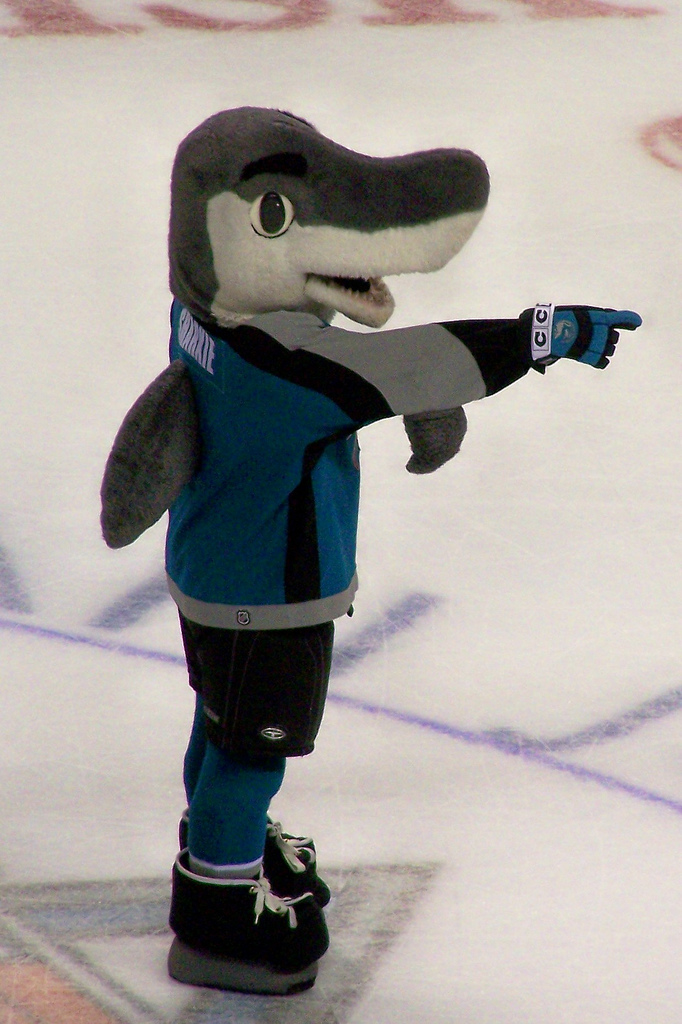 S. J. Sharkie